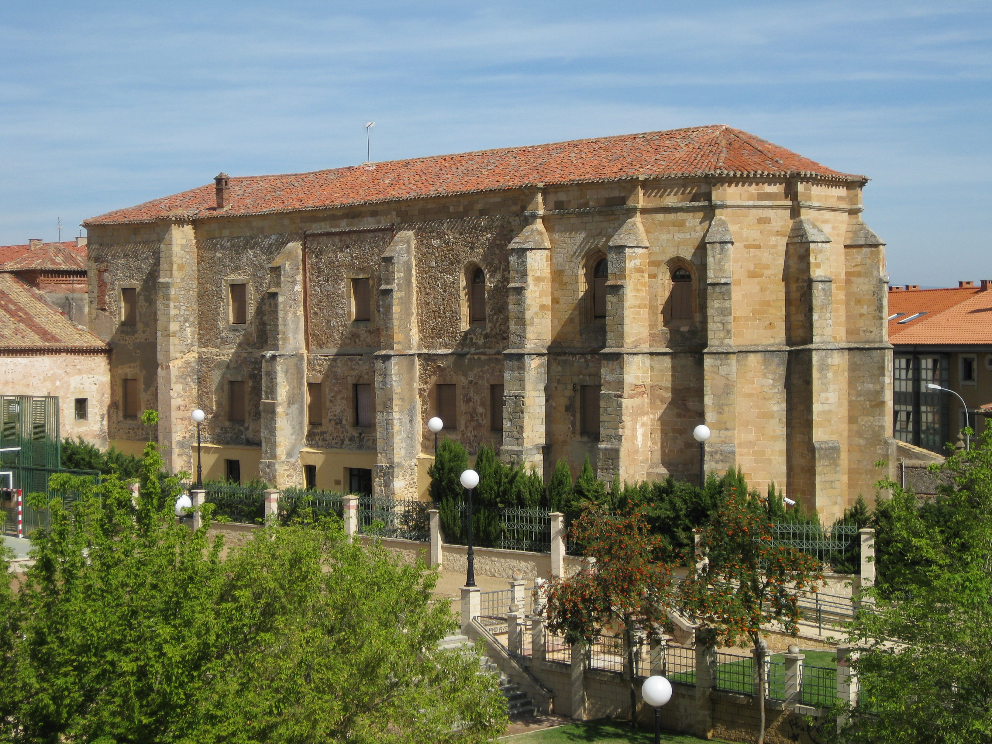 Convento de Santa Clara (Soria)